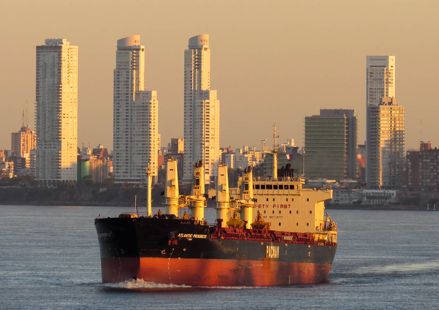 Navio navegando sobre las aguas del rio Paranà, a la altura de la Florida en Rosario